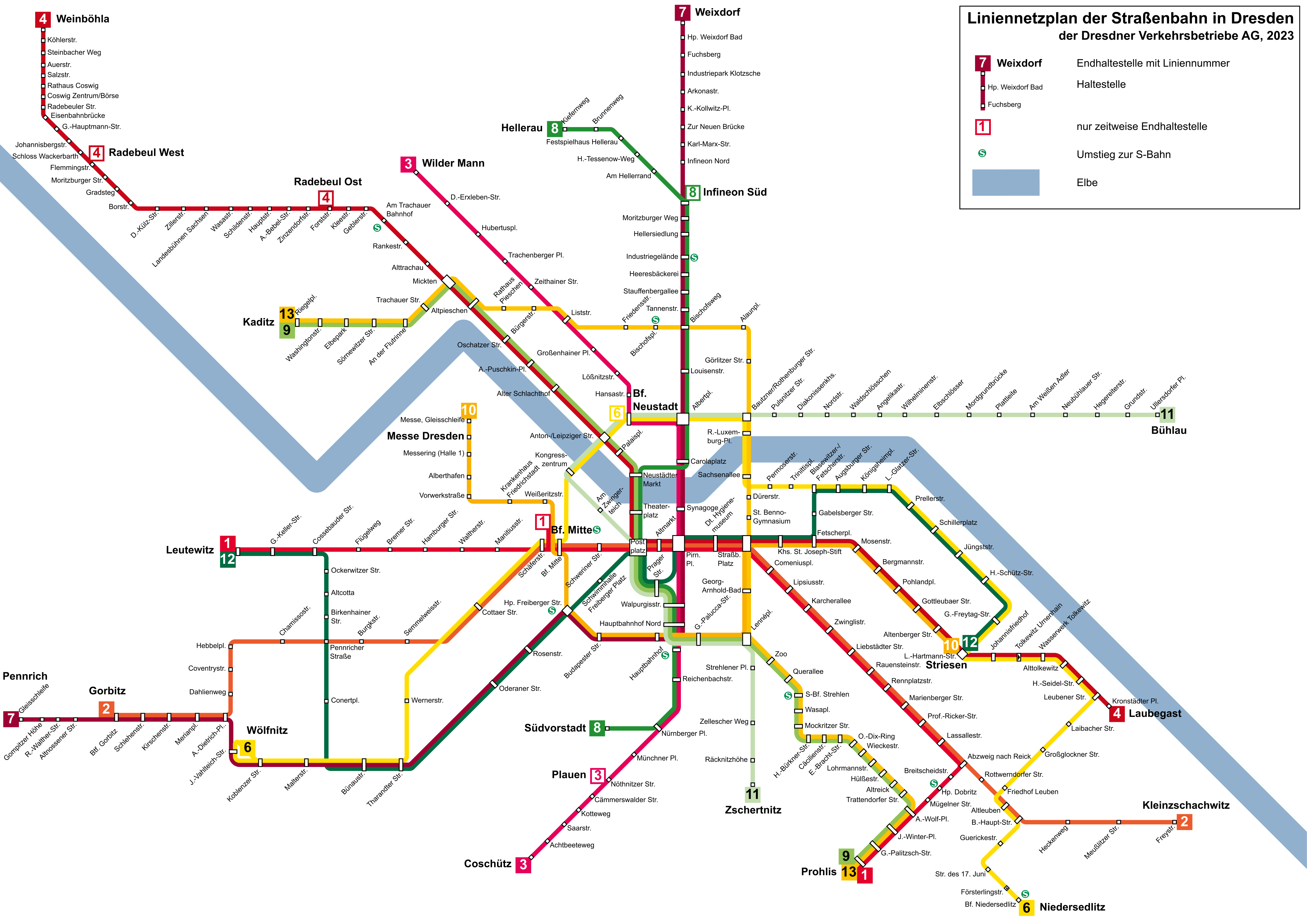 Schematischer Liniennetzplan der Straßenbahnlinien der Dresdner Verkehrsbetriebe AG, Stand 2012.